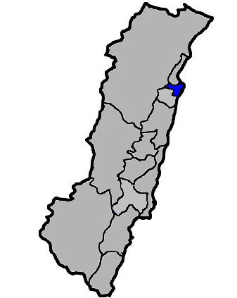 本圖係小籃子為編輯花蓮縣zh:花蓮市所繪